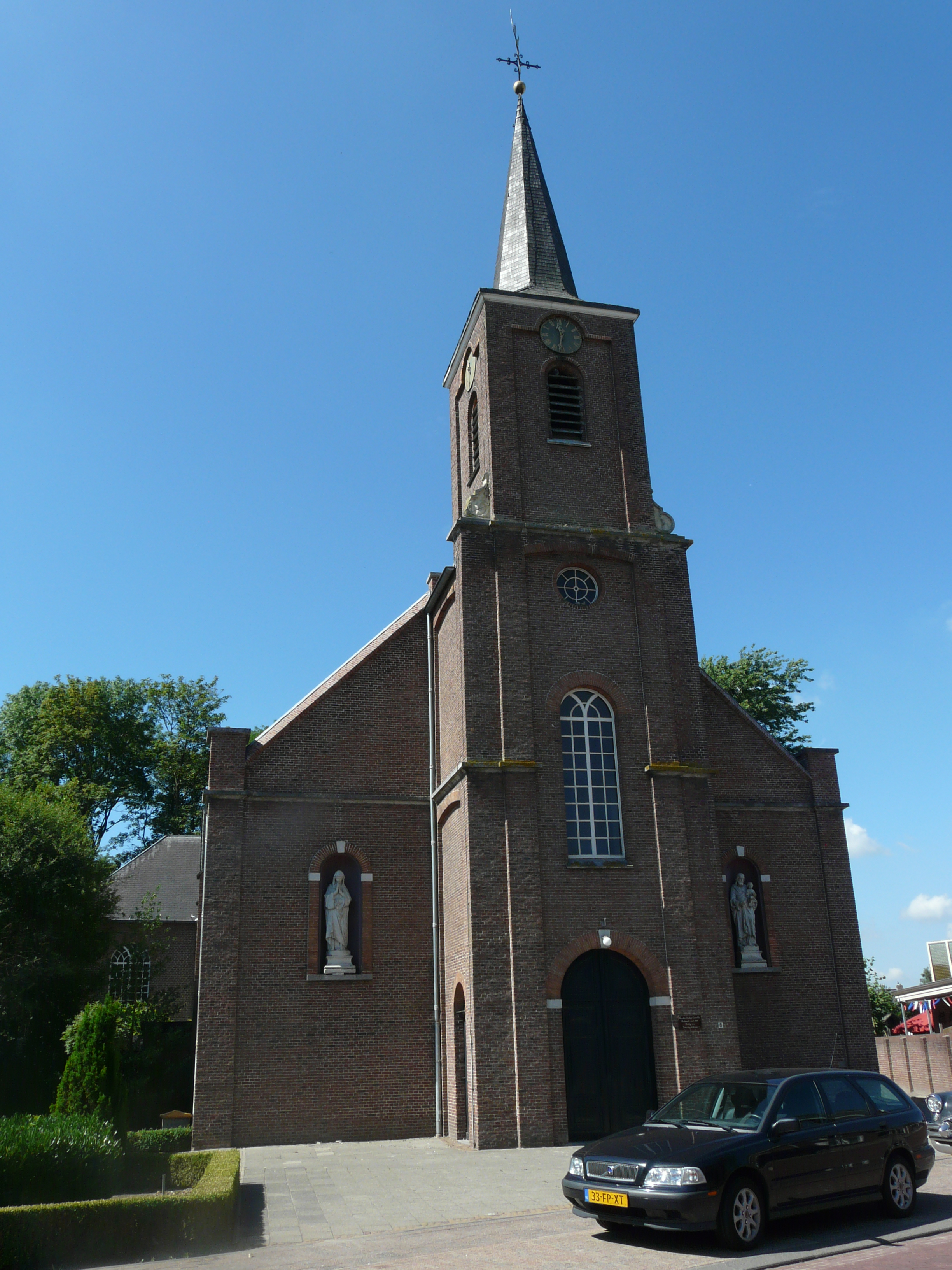 Sint-Corneliuskerk in Achtmaal